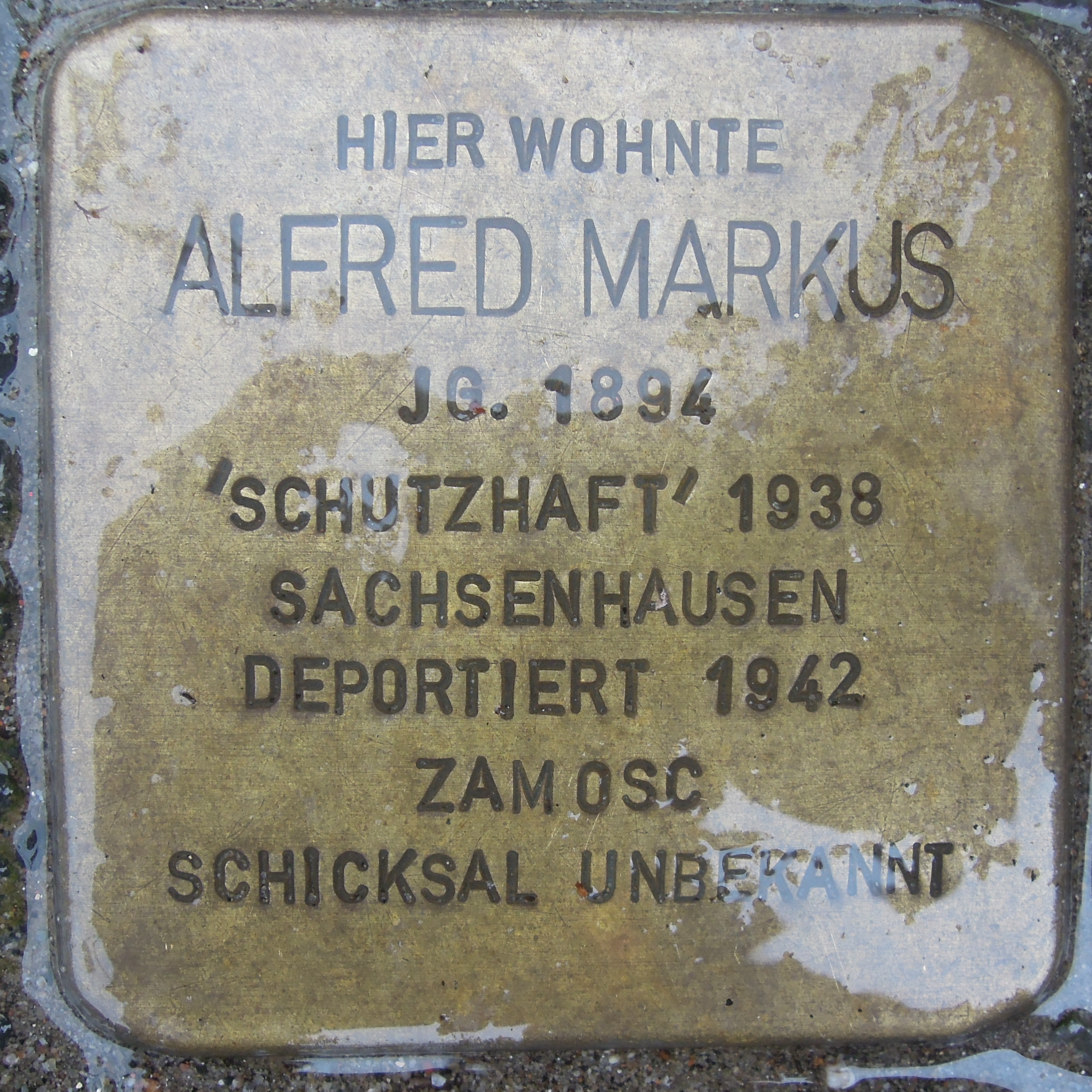 Stolperstein Hattingen Bahnhofstraße 6 für Alfred Markus